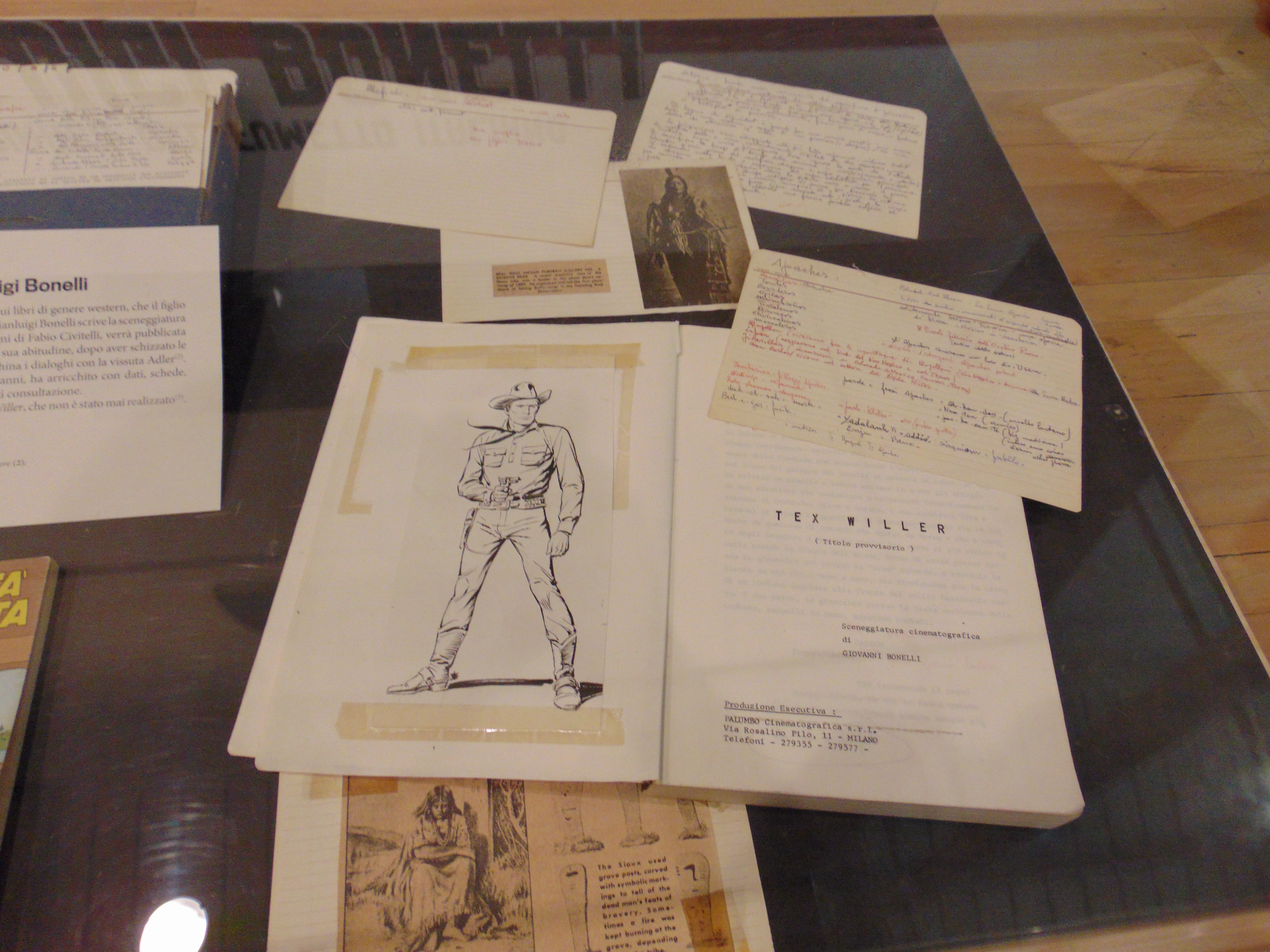 Tex - 70 anni di un mito @ Arf! Festival 2019